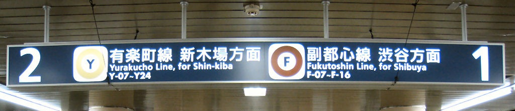 小竹向原駅1･2番線、改善前のホーム案内